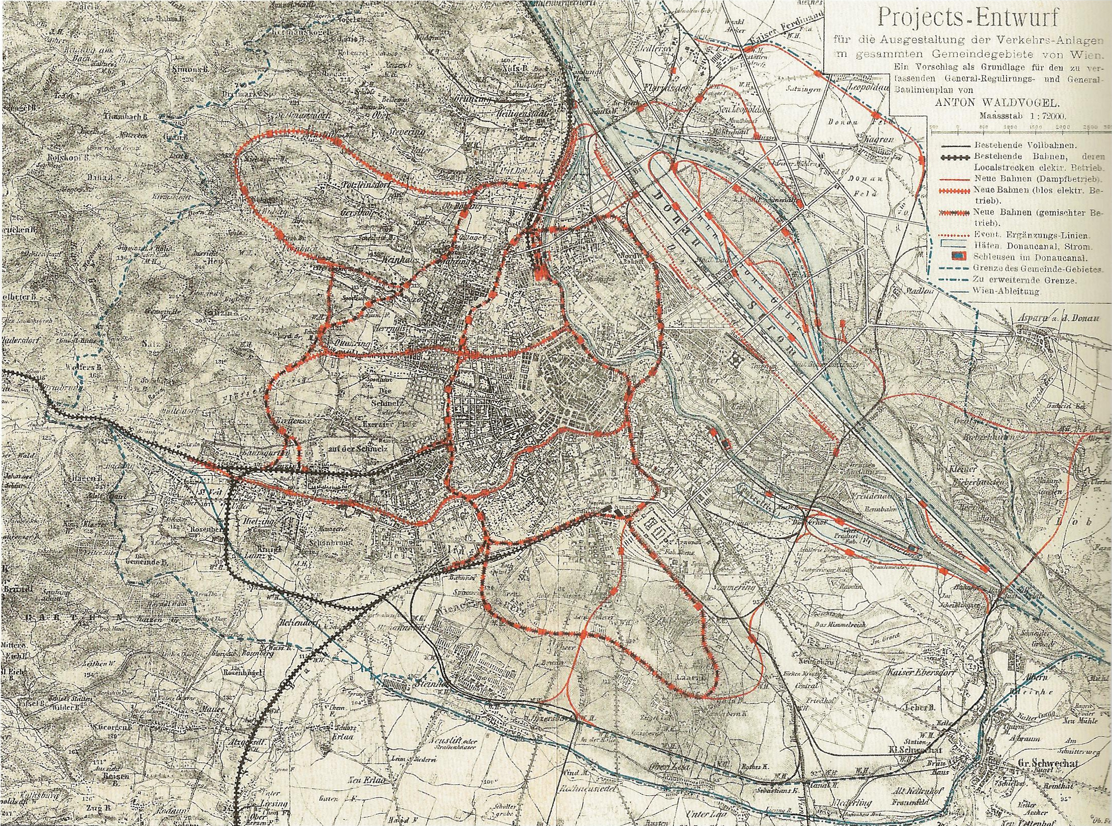 Projekto por urbfervojo de Vieno de Anton Waldvogel